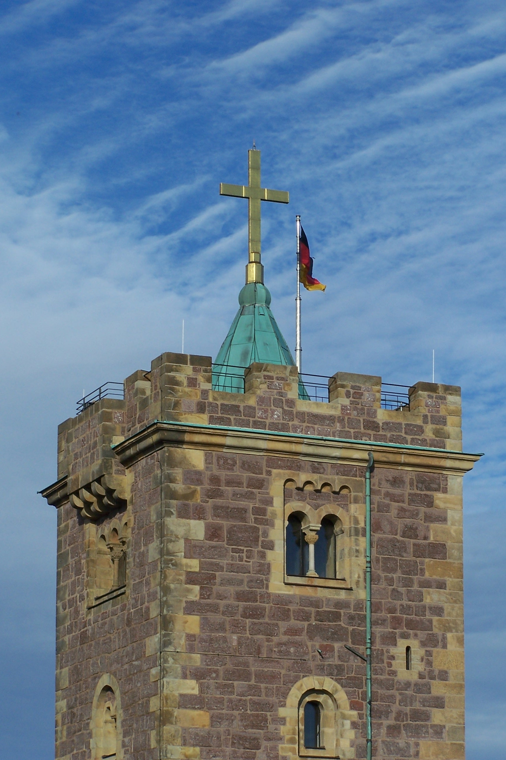 Das vergoldete Kreuz auf dem Bergfried der Wartburg sowie die Fahne der Bundesrepublik Deutschland.